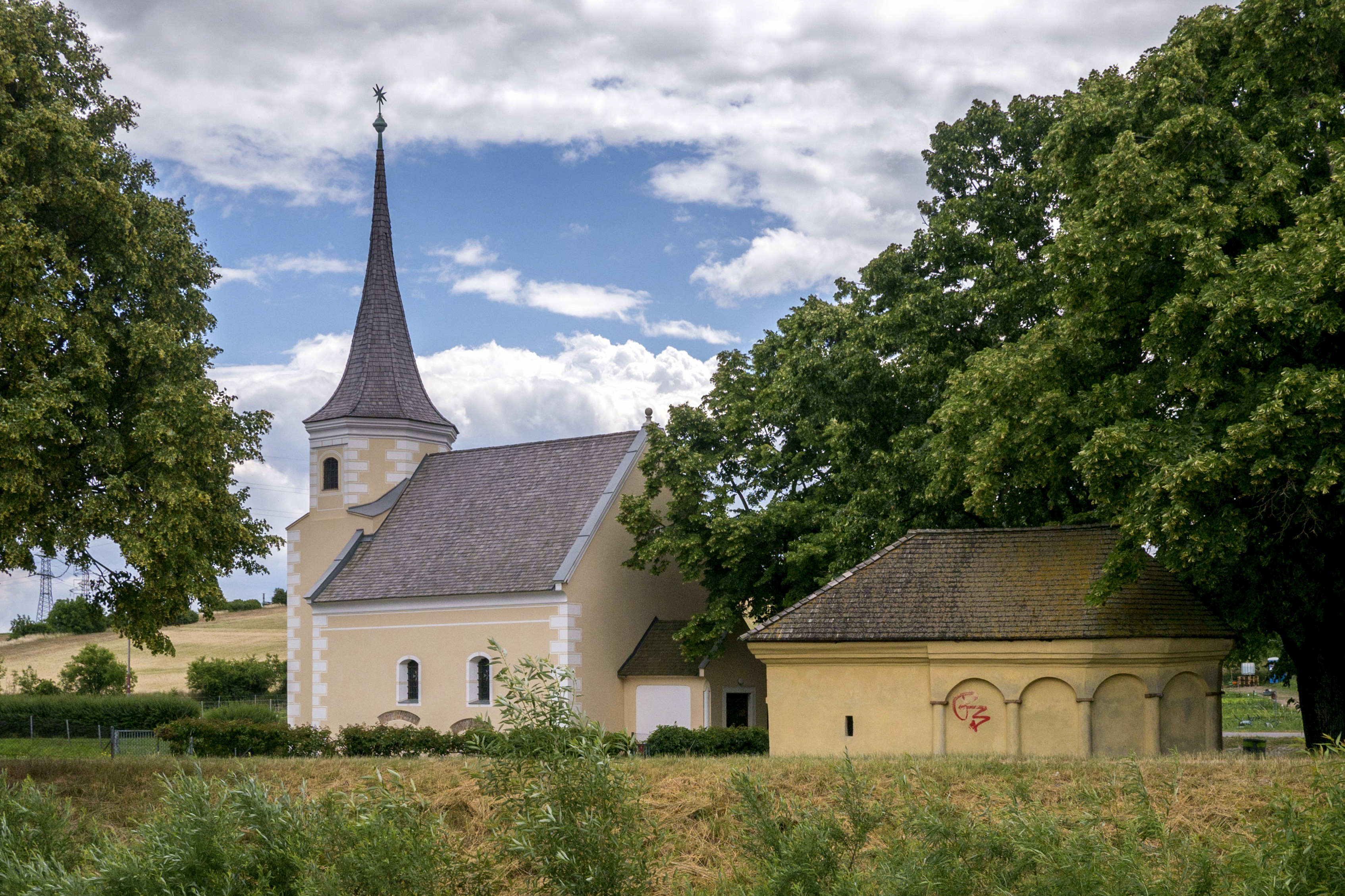 Kath. Filialkirche hl. Johannes der Täufer/Malteserkirche und Heiliggrabkapelle